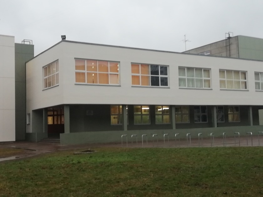 Школа Tallinna maantee 40 Narva